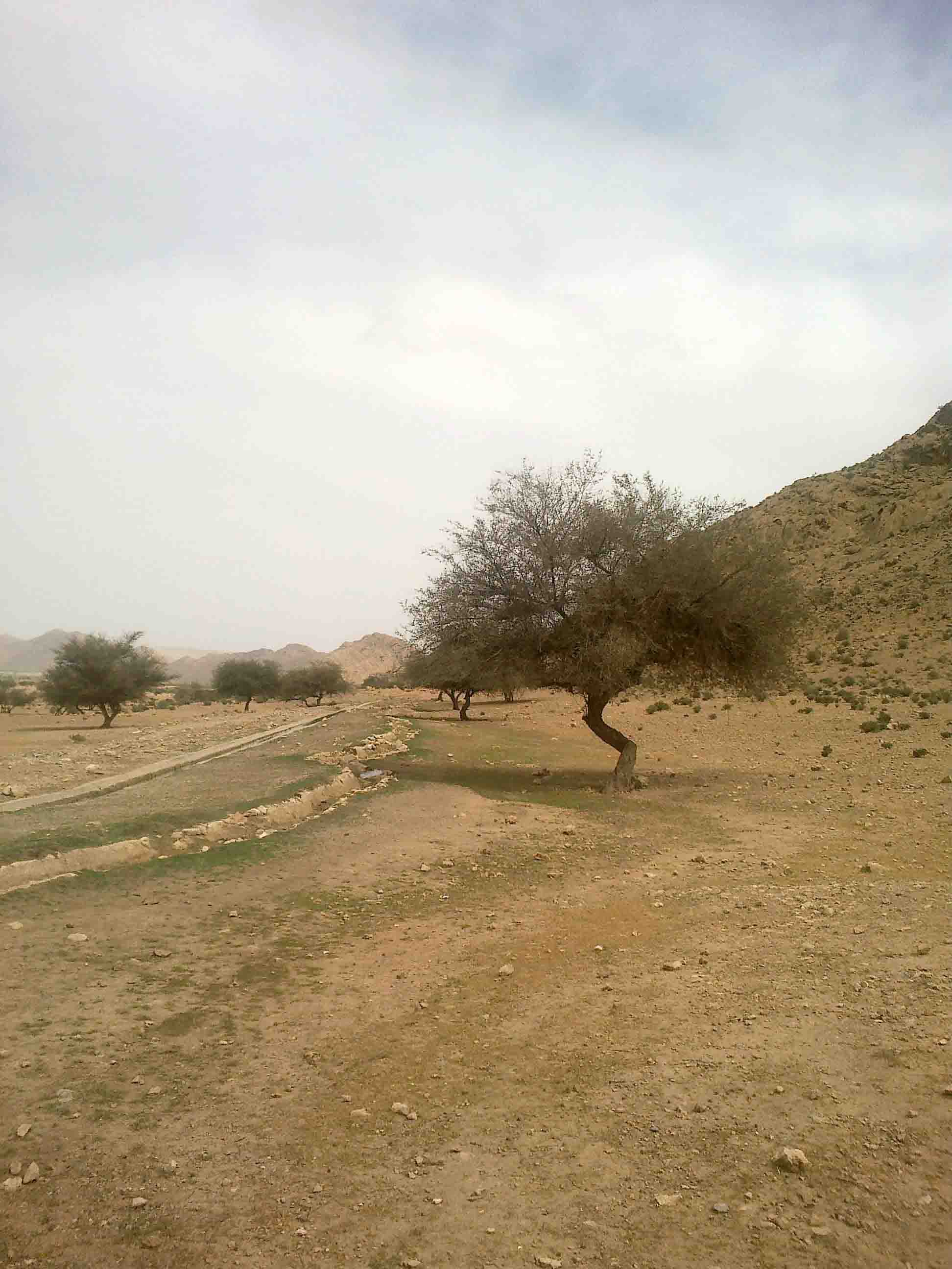 منطقه تفریحی تنگه حاجی‌آباد- نمای کوهپایه